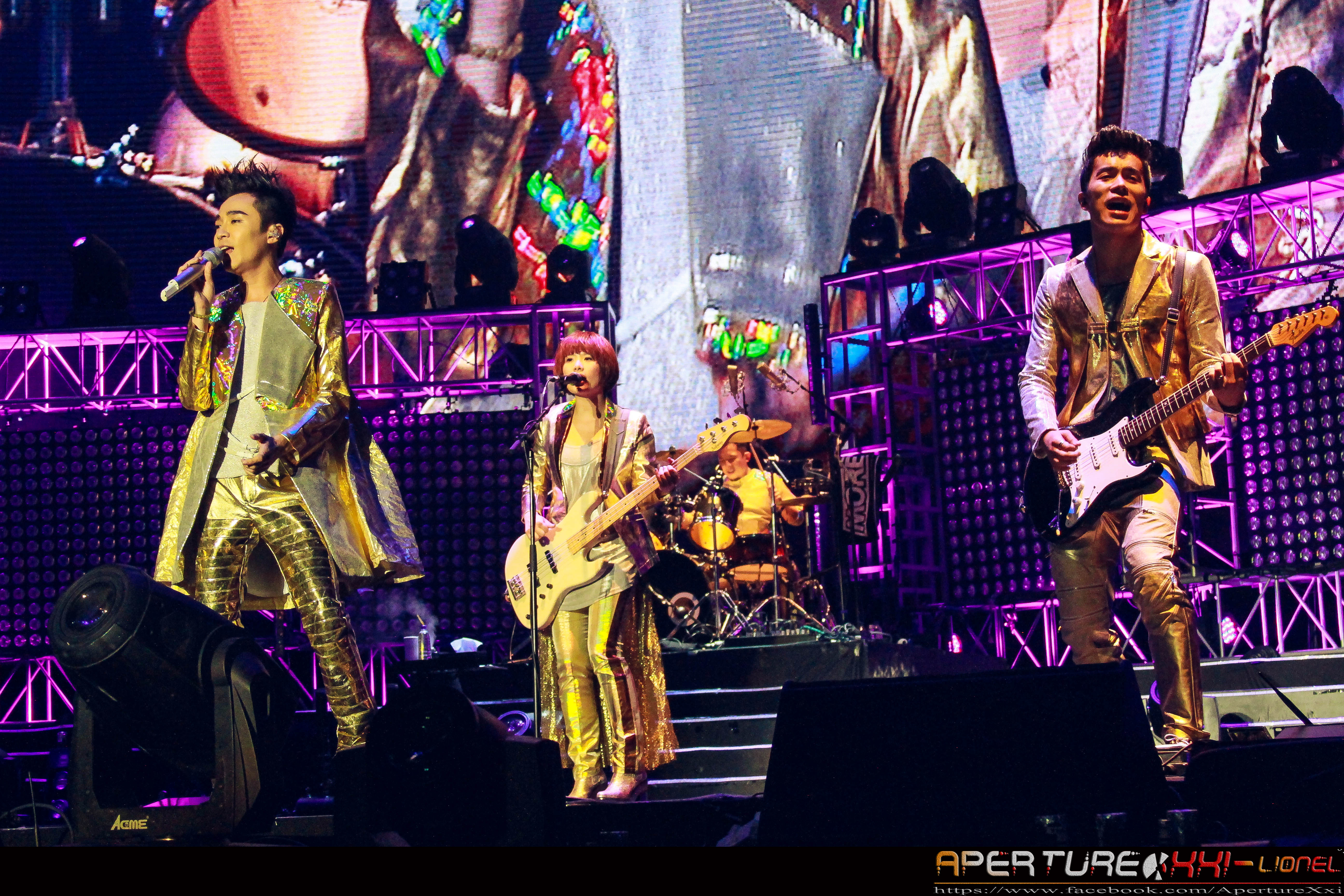 中文（中国大陆）: 2014年苏打绿10周年空气中的视听与幻觉世界巡回演唱会-新加坡站